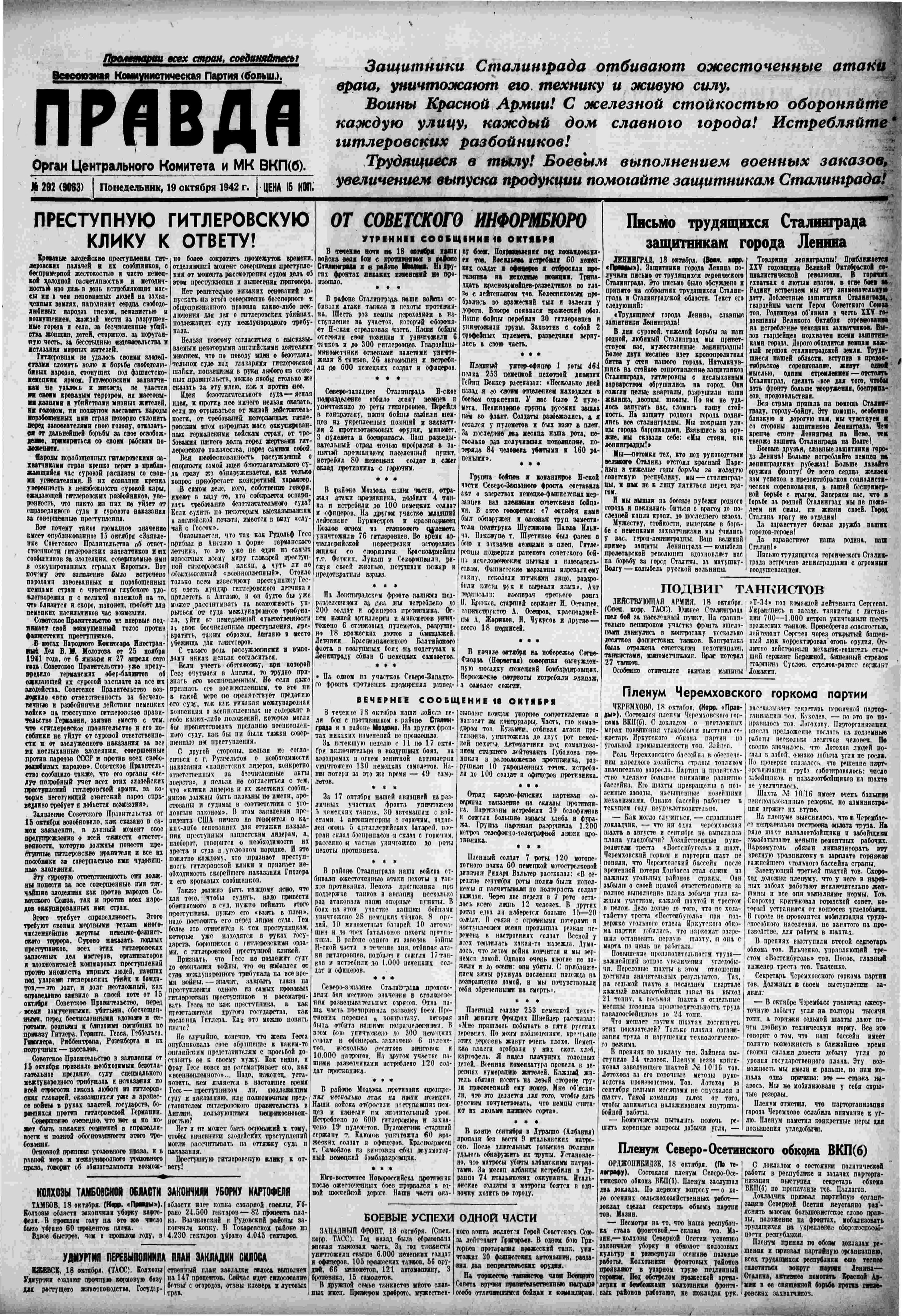 газета "Правда" от 19.10.1942